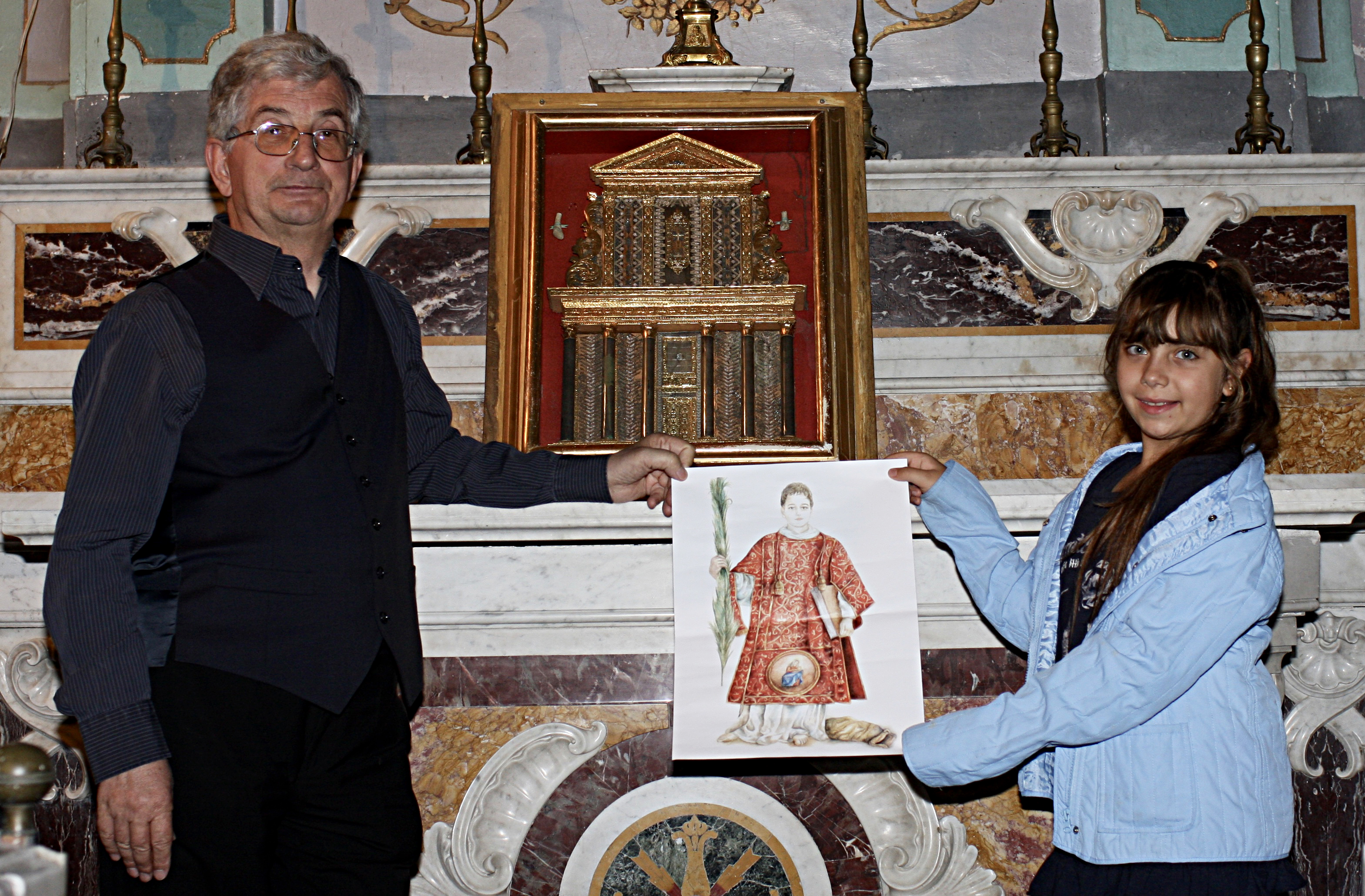 Cerreto Sannita (Benevento), Museo d'Arte Sacra: don Edoardo Viscosi accanto al reliquiario-calendario, contenente un frammento osseo di S. Cesario, e alla nuova icona del santo. Foto di Andrea Ferrigno.